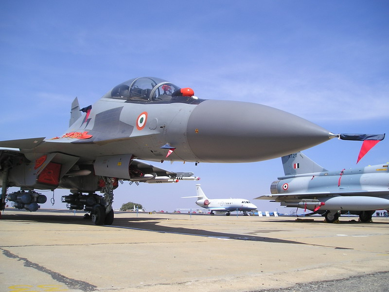 Indian Air Force Sukhoi-30MKII during Aeroindia 2005, Bangalore, India